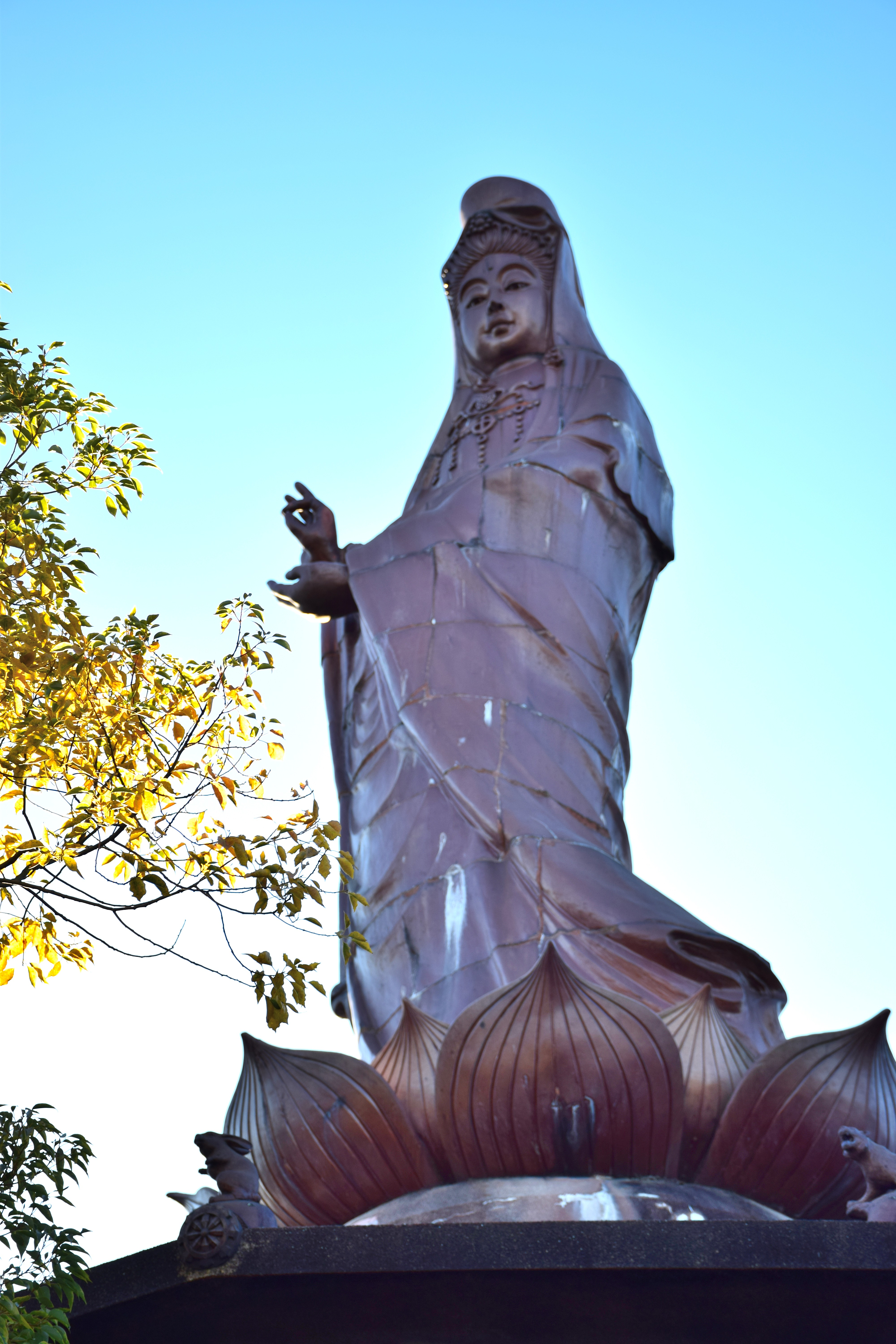 衣浦観音（観音寺境内にある日本一という高さ８ｍの陶管焼の観音像）